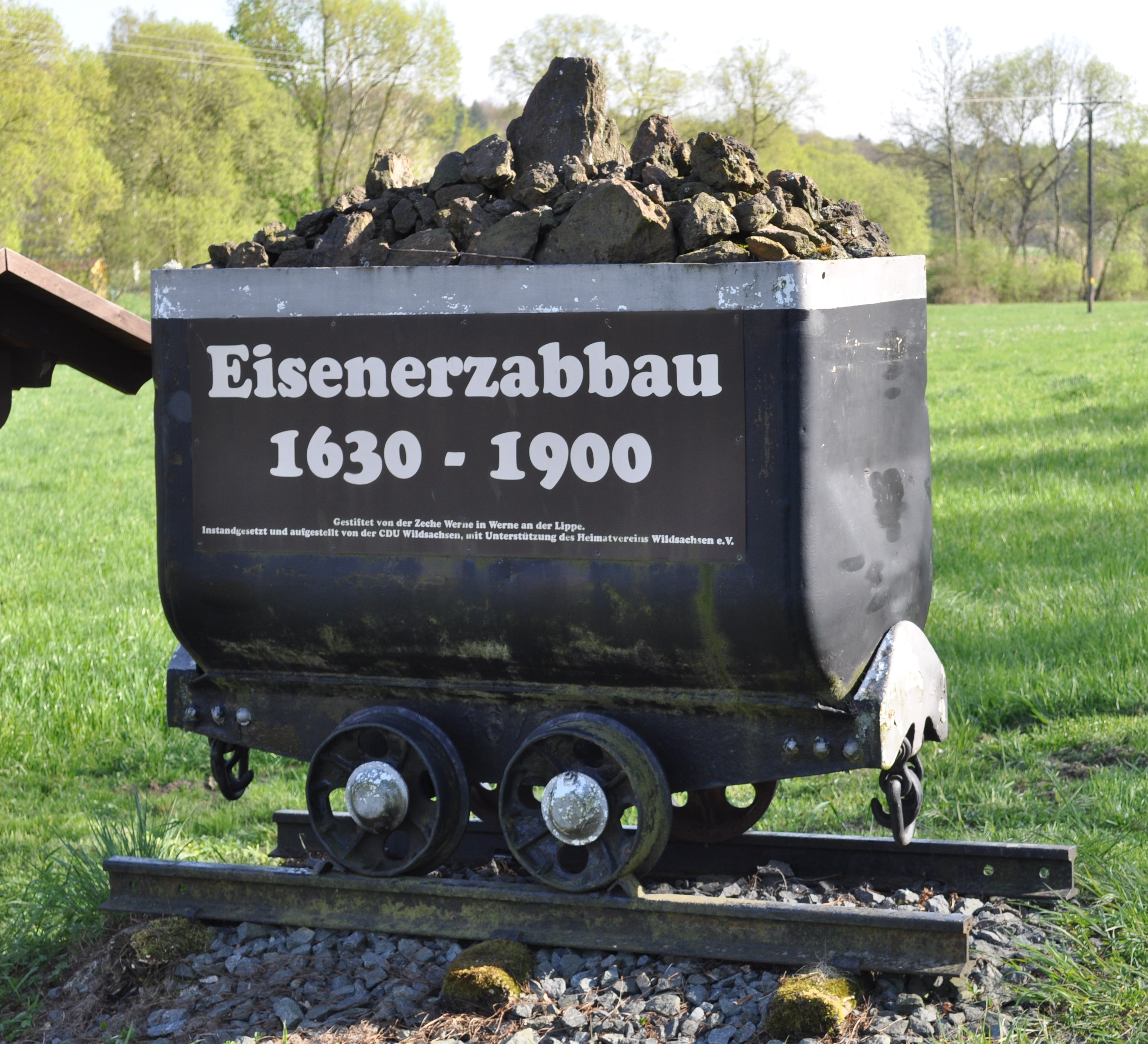 Eisenerzlore am Ortseingang von Wildsachsen zur Erinnerung an den Bergbau in Wildsachsen